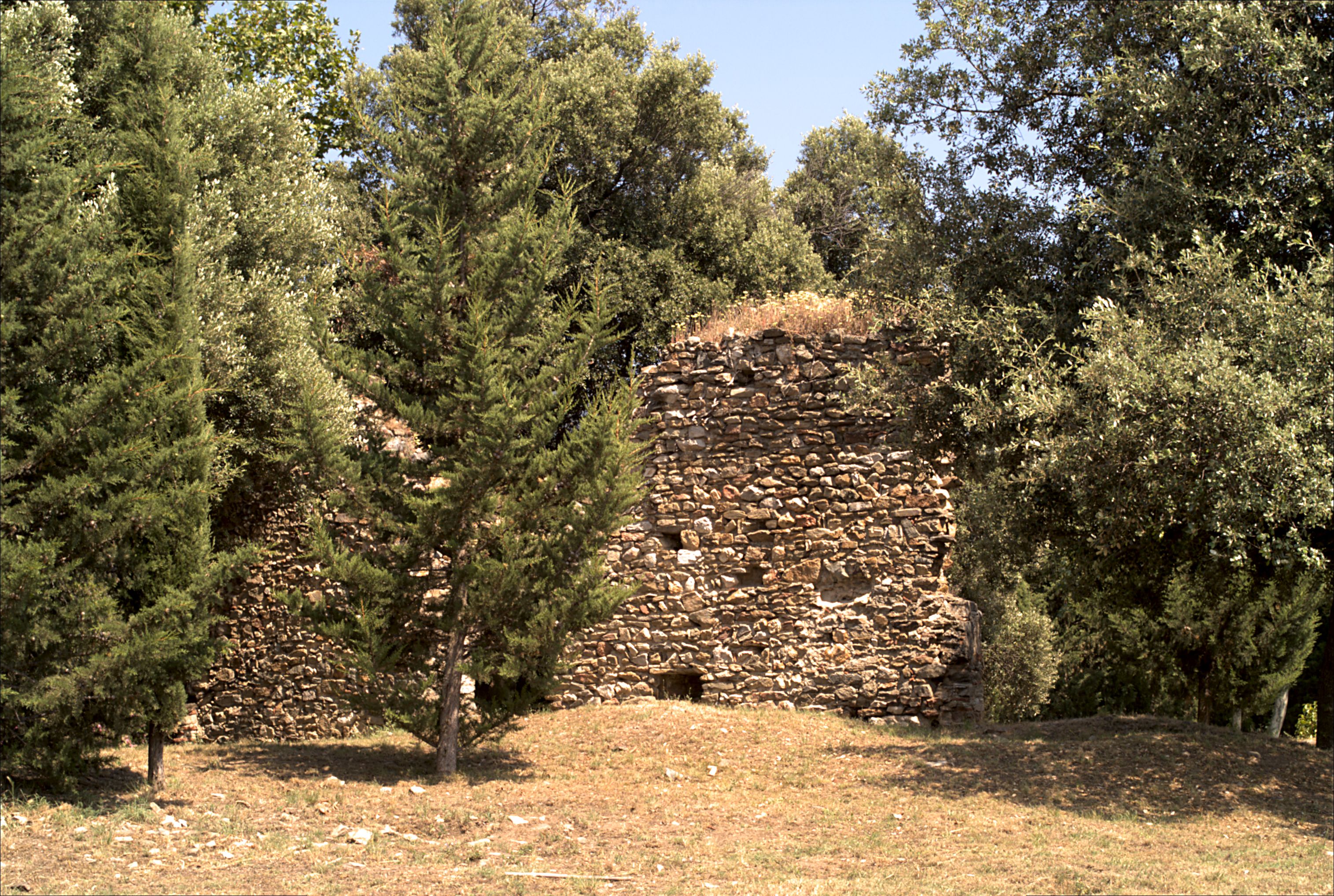 Ruines près de l'Église Sainte-Marie de La Cluse Haute, Les Cluses (Pyrénées-Orientales, Languedoc-Roussillon, France)